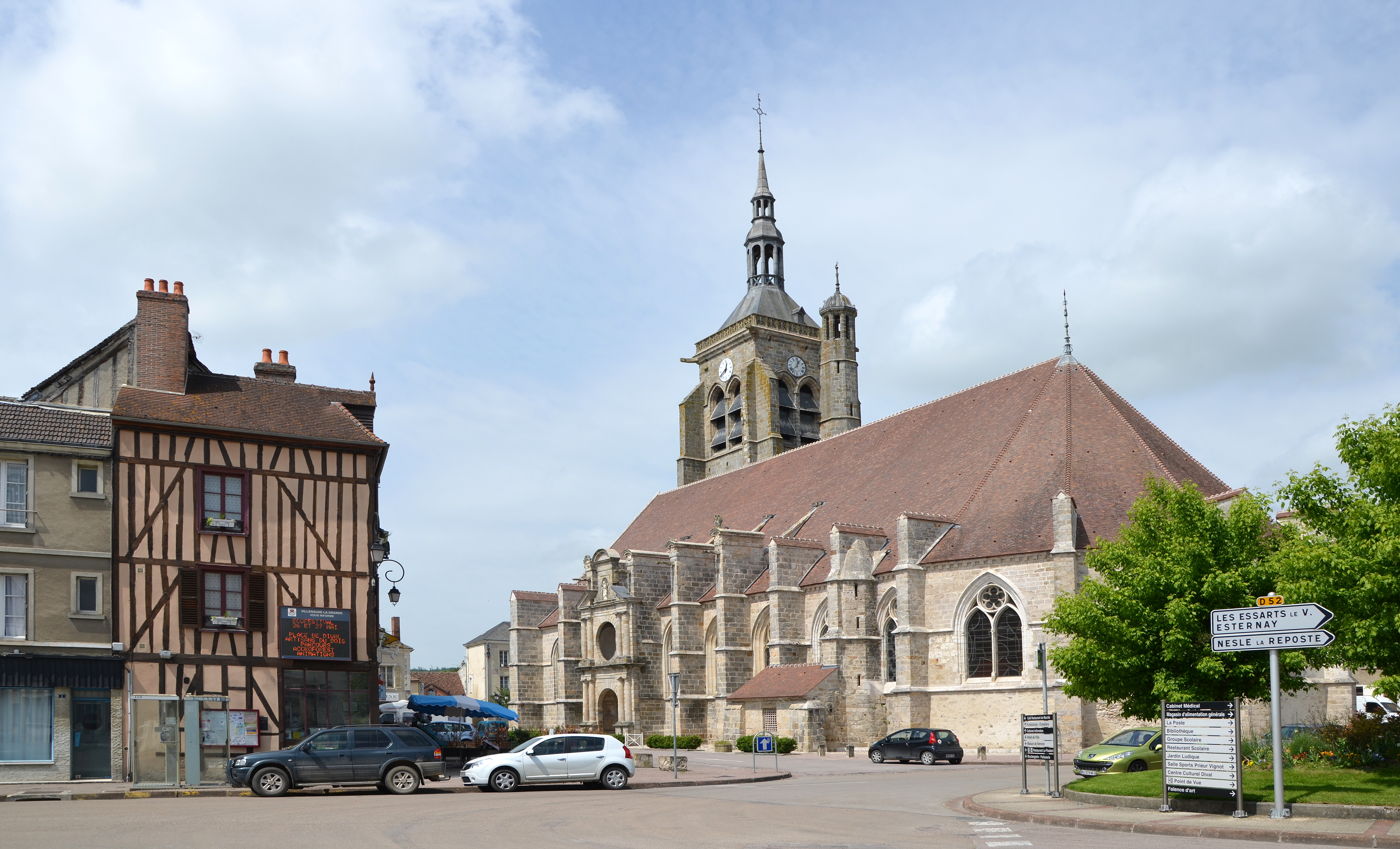 Place principale de Villenauxe-la-Grande, Aube, France